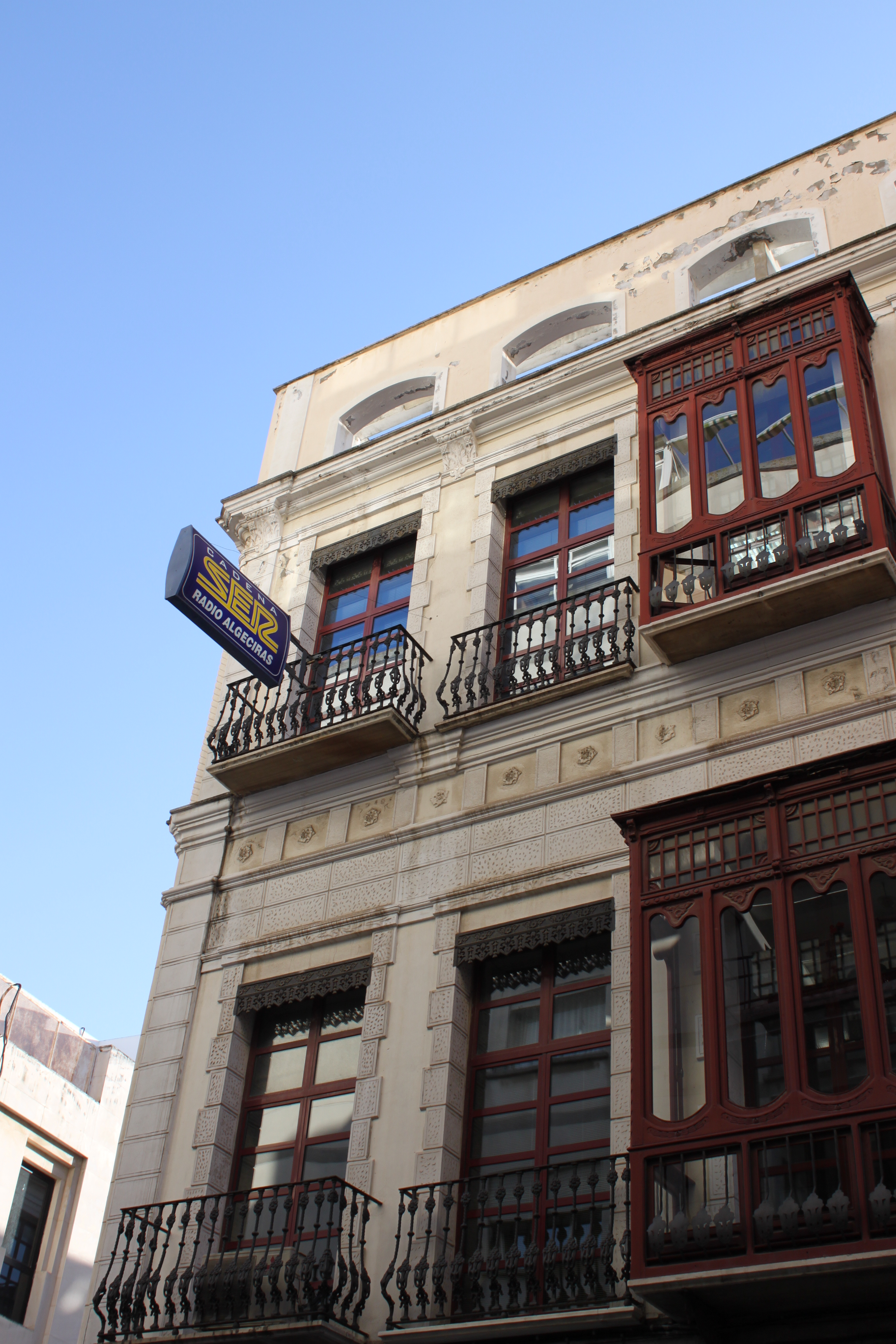 Sede de Radio Algeciras, en Algeciras, Andalucía, España